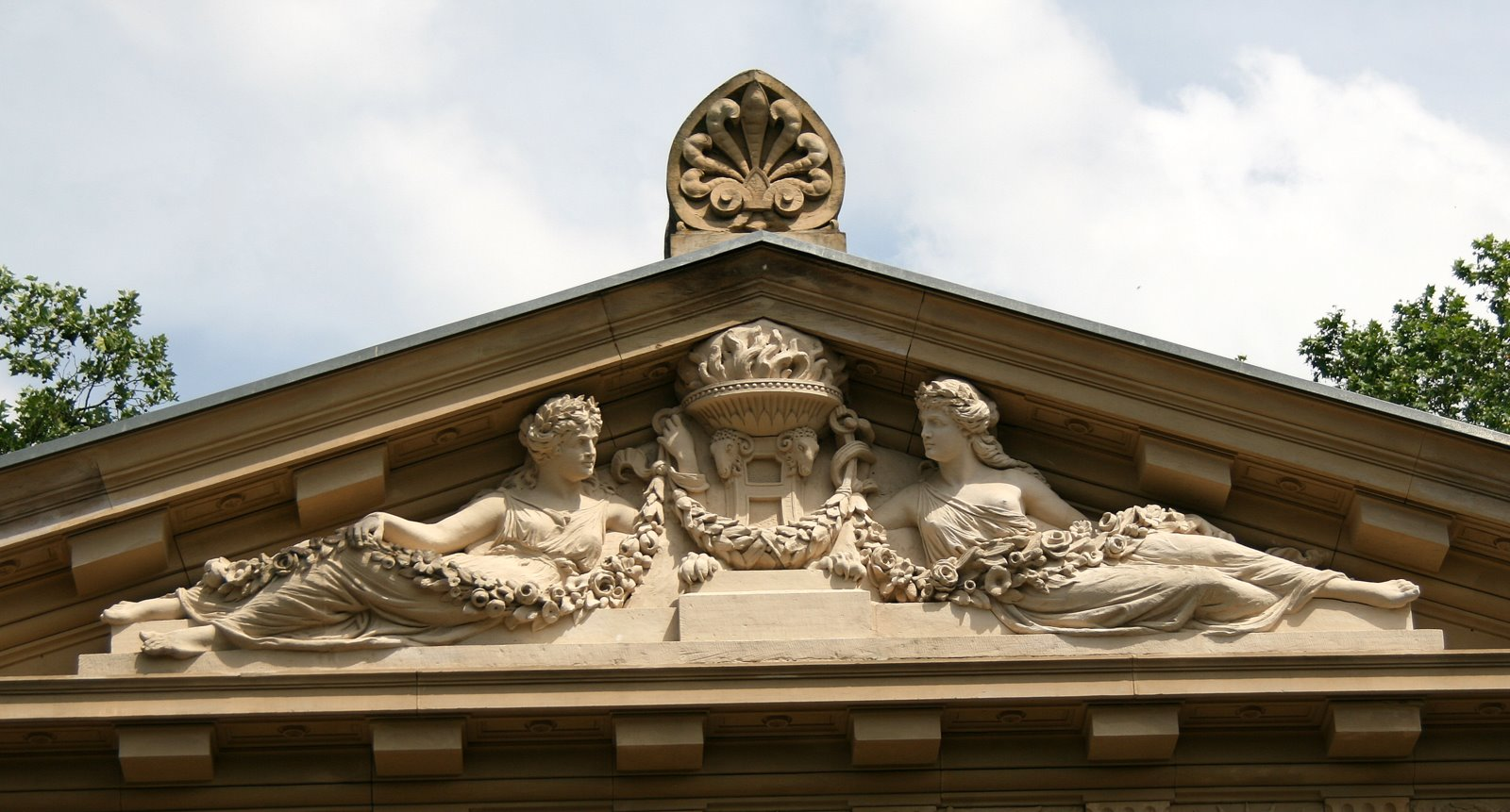 Giebel des Krematoriums in Heidelberg